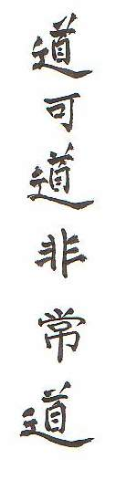 Eerste zin Tao Te Tsjing. Calligrafie en foto door Louk Dubois. Op de verwijderlijst ? Louk Dubois is een vriend van me en die heeft op mijn verzoek juist ten behoeve van de wikipedia deze chinese tekst gecalligrafeerd en gefotografeerd en aan mij per email toegestuurd om hem te uploaden. Hoe moet dat nu verder met patentrecht enzo ? Jan Duimel 23 jan 2007 12:14 (CET) Louk Dubois heeft mij donderdag 25 jan 2007 telefonisch verklaard dat dit plaatje onder de GNU-licentie verspreid mag worden. Dat lijkt me voldoende. Mocht dat niet zo zijn, gelieve kontakt op te nemen. Jan Duimel 26 jan 2007 12:04 (CET)